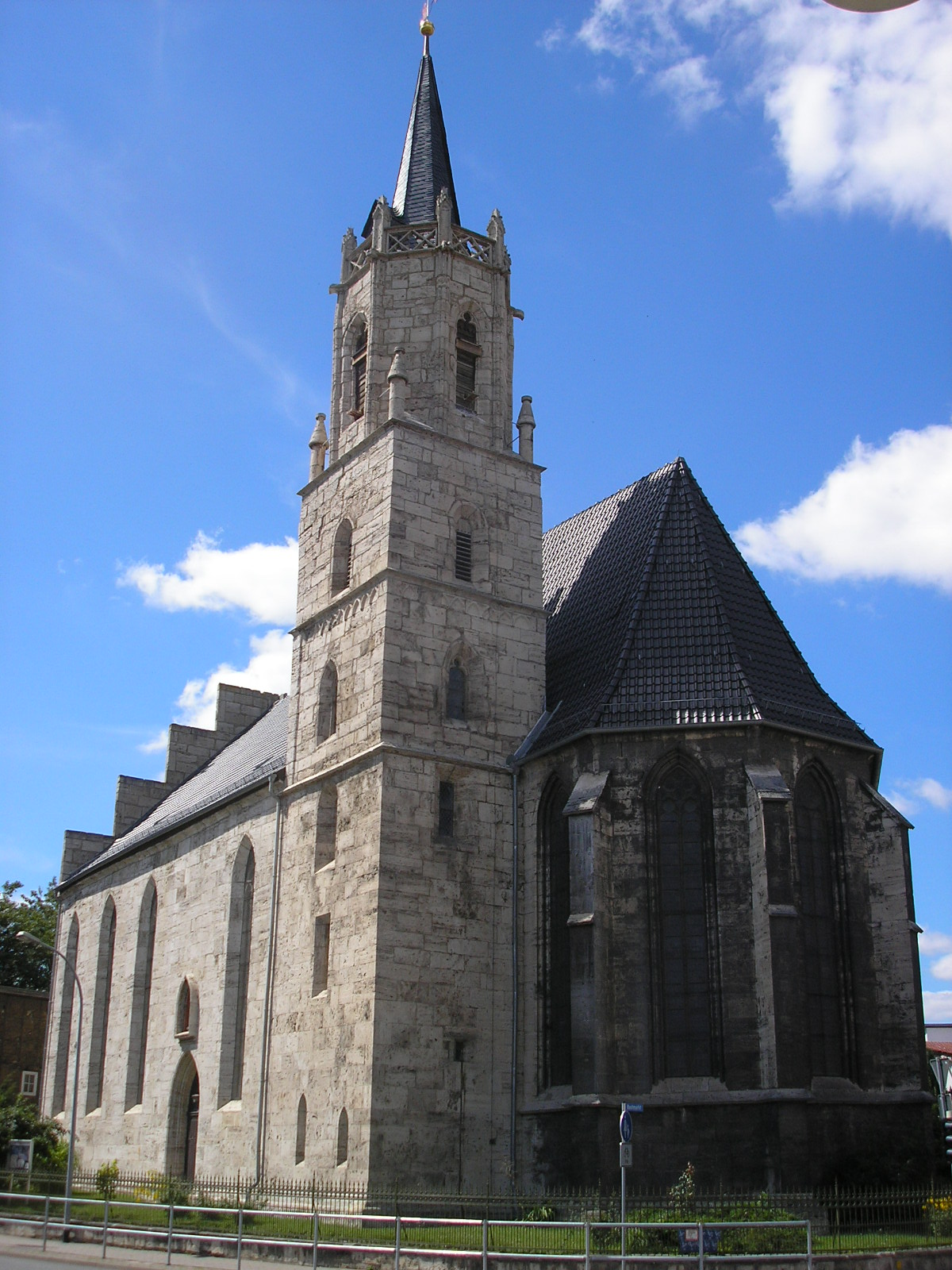 Die Nicolaikirche in Mühlhausen (Thüringen).